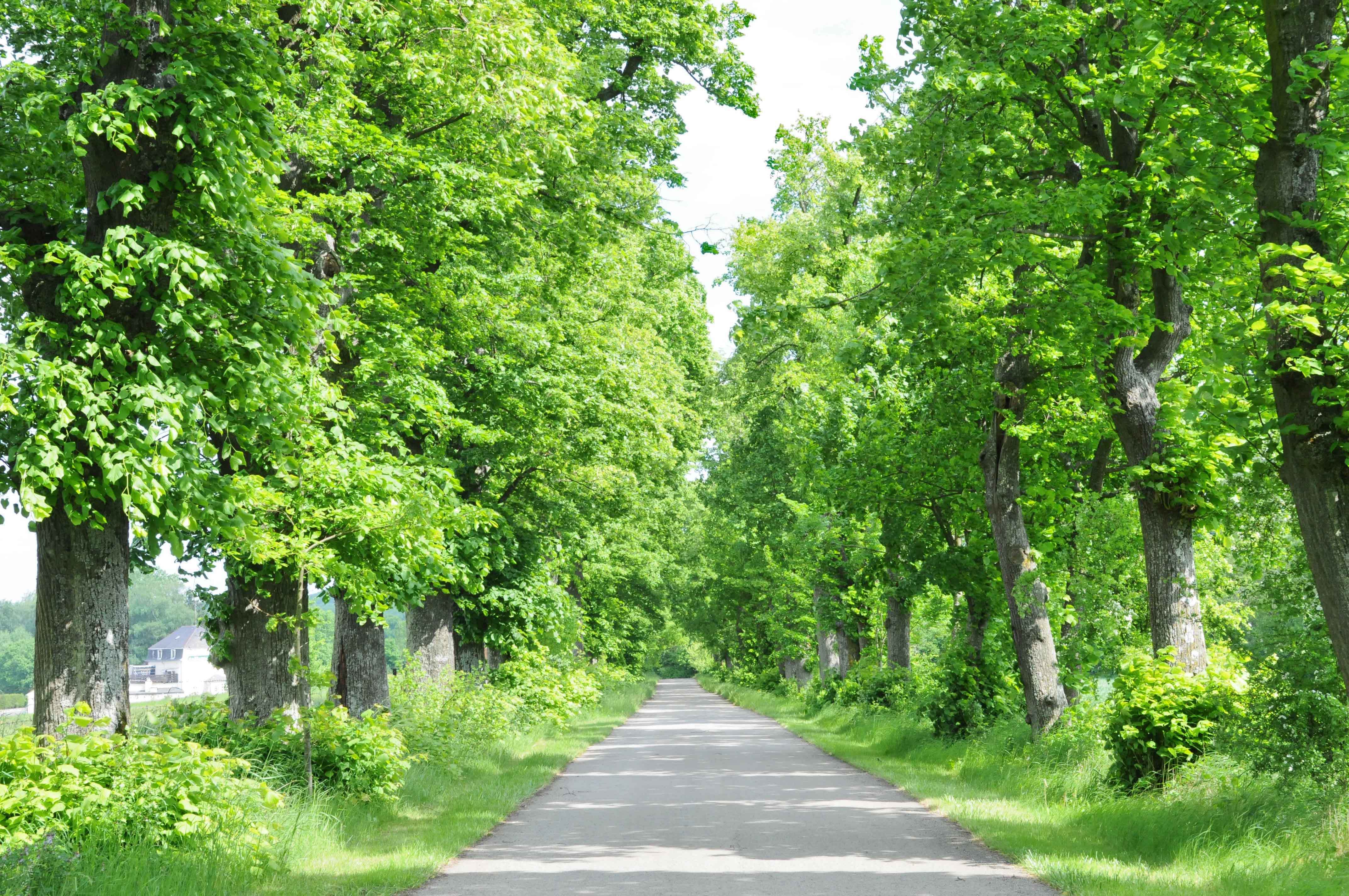 Lannenalle um Gréiwelshaff.